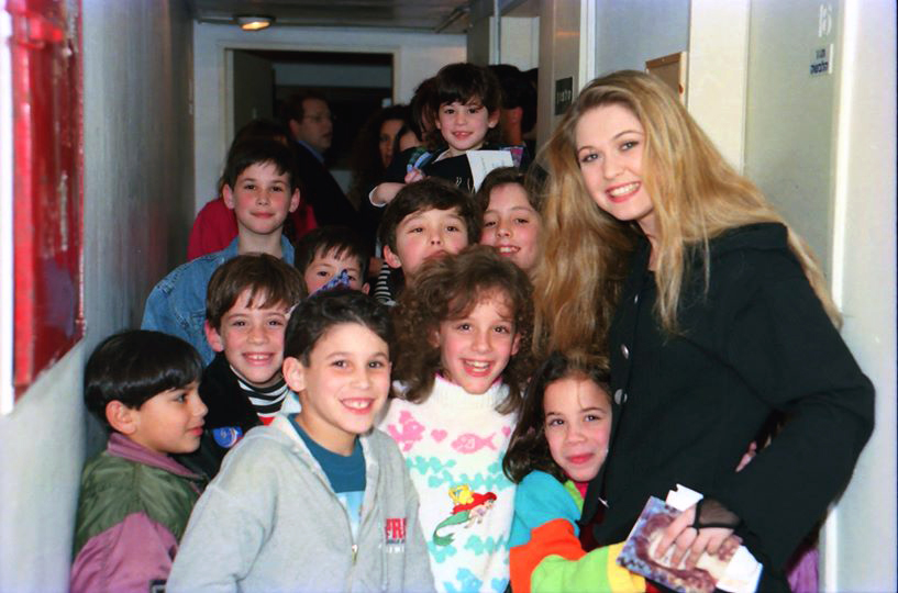 מיכל ינאי והילדים